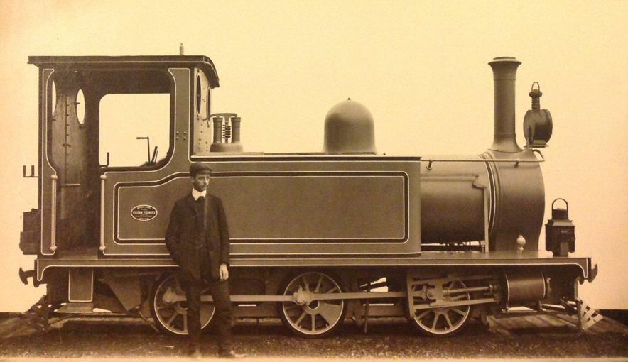 Bengal Provincial Railway, 2-4-0T, No 5, 1905 (Vulcan photograph No 2092]